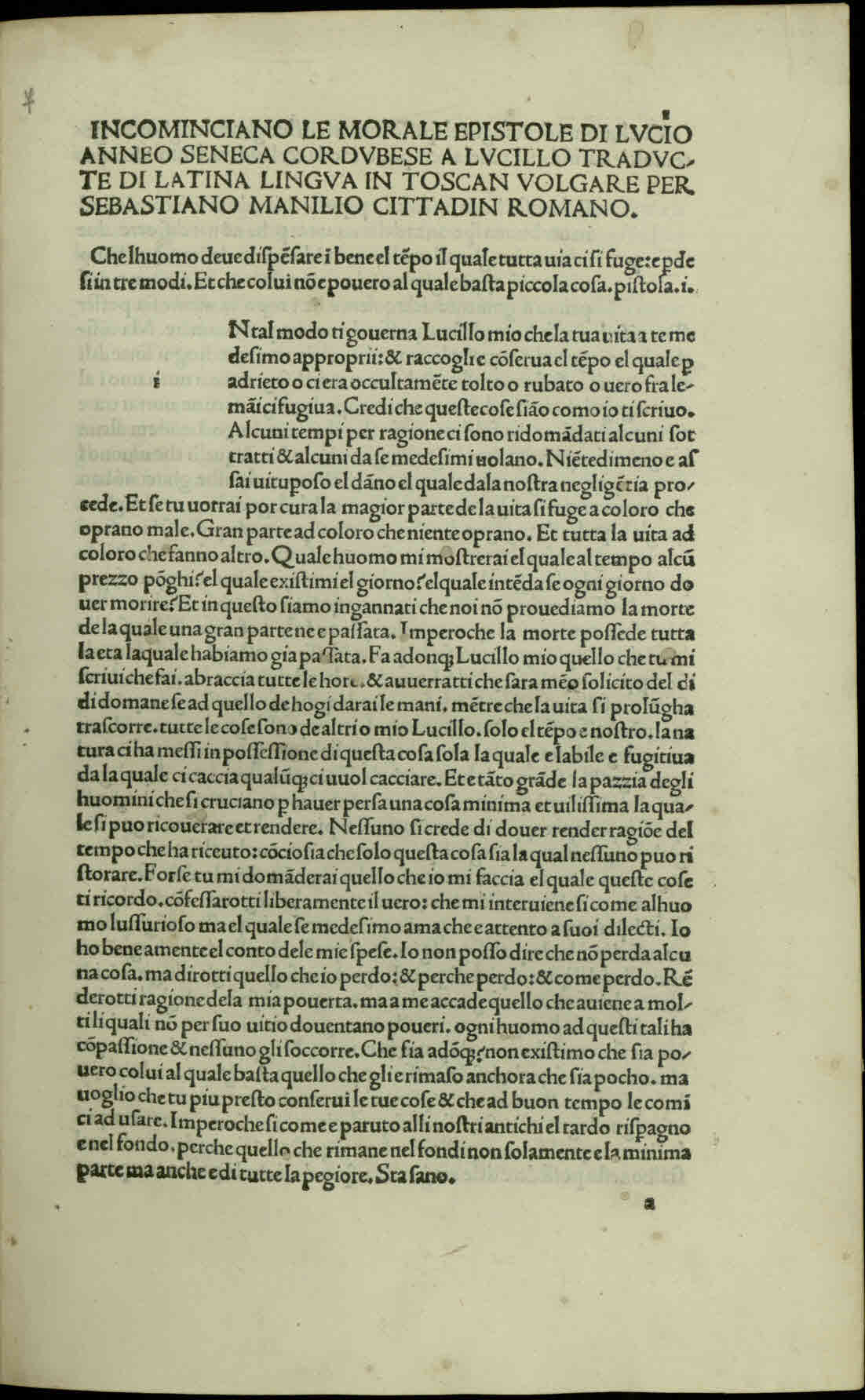 Epistolae ad Lucilium (italiano). - Impresse nella inclita citta de Venetia : per industria di Sebastian Manilio romano … insiemi con li providi huomini stefano Bernardino Dinali fratelli, MCCCCLXXXXIIII a di XIIII di Aprile. - 176 c. ; [*]⁴, [**]², a-o⁶, p-q⁴, r-y⁶, z⁴, &⁴, [us]⁴, [rum]⁴, A-E⁴, F⁶ ; fol. - Errori nella cartulazione araba a stampa .